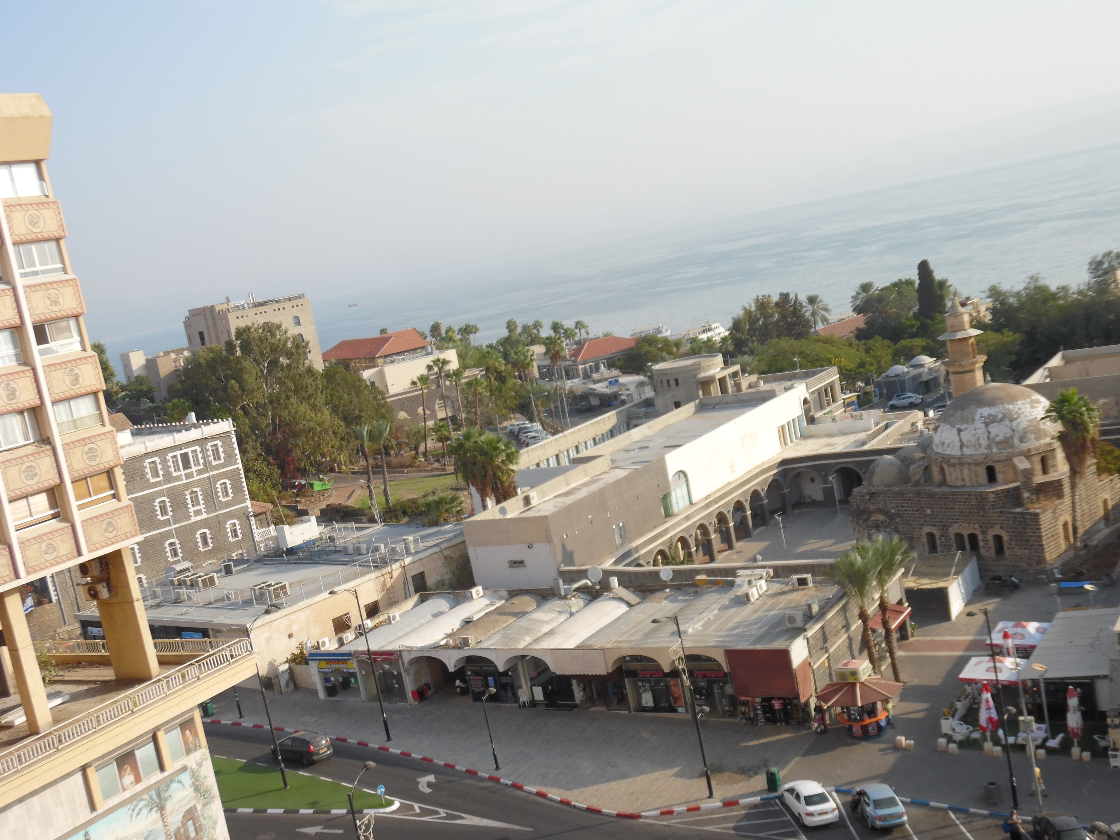 העיר העתיקה של טבריה נוסדה על ידי הורדוס אנטיפס, בנו של המלך הורדוס